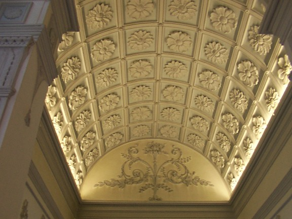 zelfgemaakte foto (E.C.M. Peek)